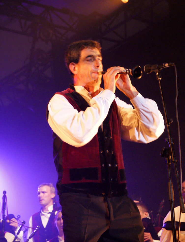 à la bombarde lors du concert Kejaj, avec le Bagad Ronsed Mor de Locoal Mendon, au Festival Interceltique de Lorient.